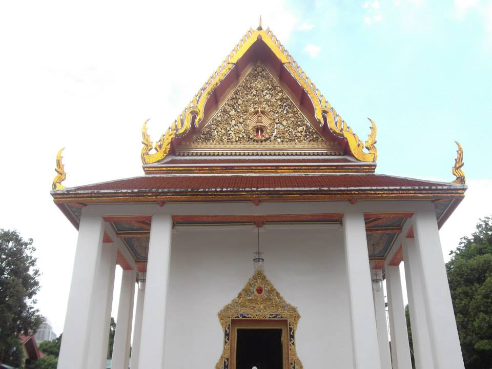 วัดบรมนิวาส